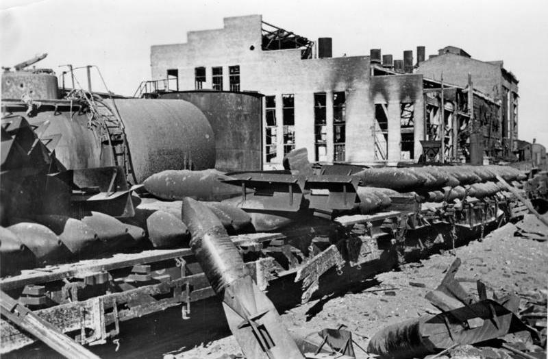 Russland, Kampf um Stalingrad, Zerstörungen Unser Bild zeigt ein erobertes Panzerwerk in Stalingrad, das nur noch aus Ruinen besteht. PK-Aufnahme: Kriegsberichter Herber (Sch) 16.11.42 [Herausgabedatum] (6345) [Sowjetunion.- Schlacht um Stalingrad]